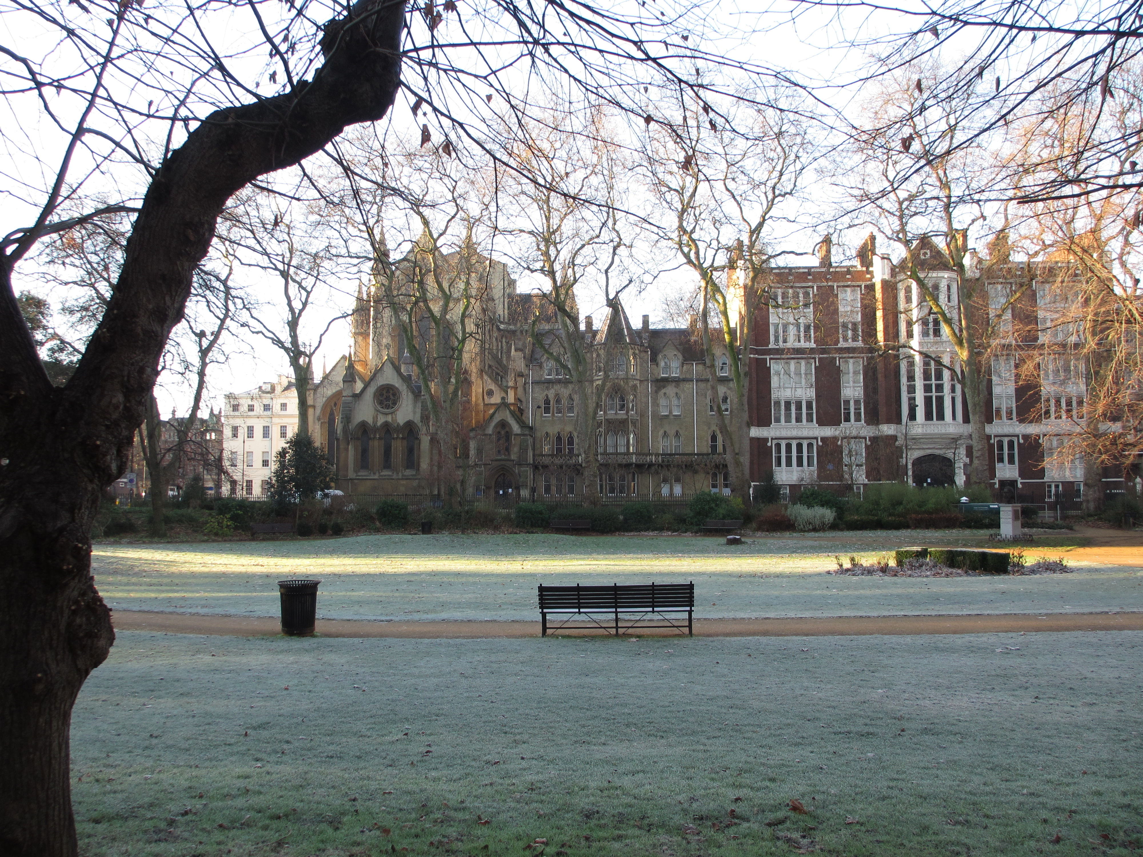 Gordon Square Gardens (Wintertime) London